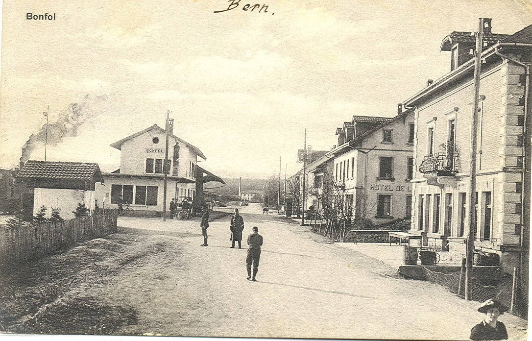 La gare du village de Bonfol dans le canton du Jura en Suisse vers 1910. Carte postale ancienne